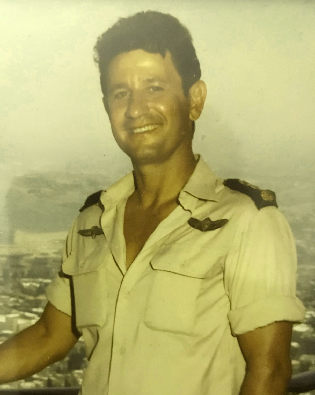 סרן אבנר קורא מפקד יחידה 838